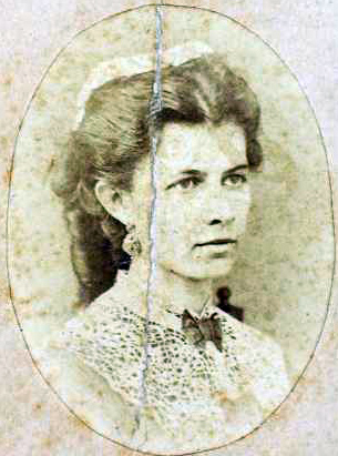 Ольга Петрівна Драгоманова-Косач (Олена Пчілка). Київ